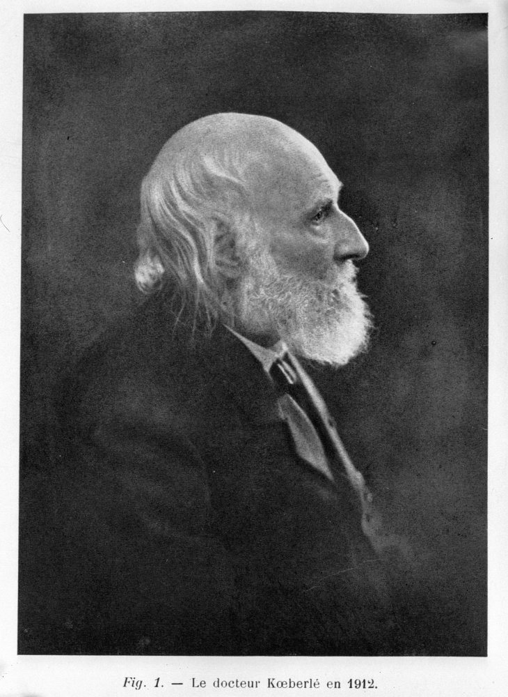 Réf. image : 02236 Portrait de Koeberlé en 1912 20e siècle Auteur de l'ouvrage : PICHEVIN, R. Ouvrage : Le docteur Koeberlé et son oeuvre Edition : Strasbourg : Revue Alsacienne, 1914 Cote : 067207 Empl. de l'image : Page de titre Technique : Impr. photomécanique - Photogravure Fiches bio-bibliographiques : KOEBERLE (Eugène) - Adresse permanente de cette image